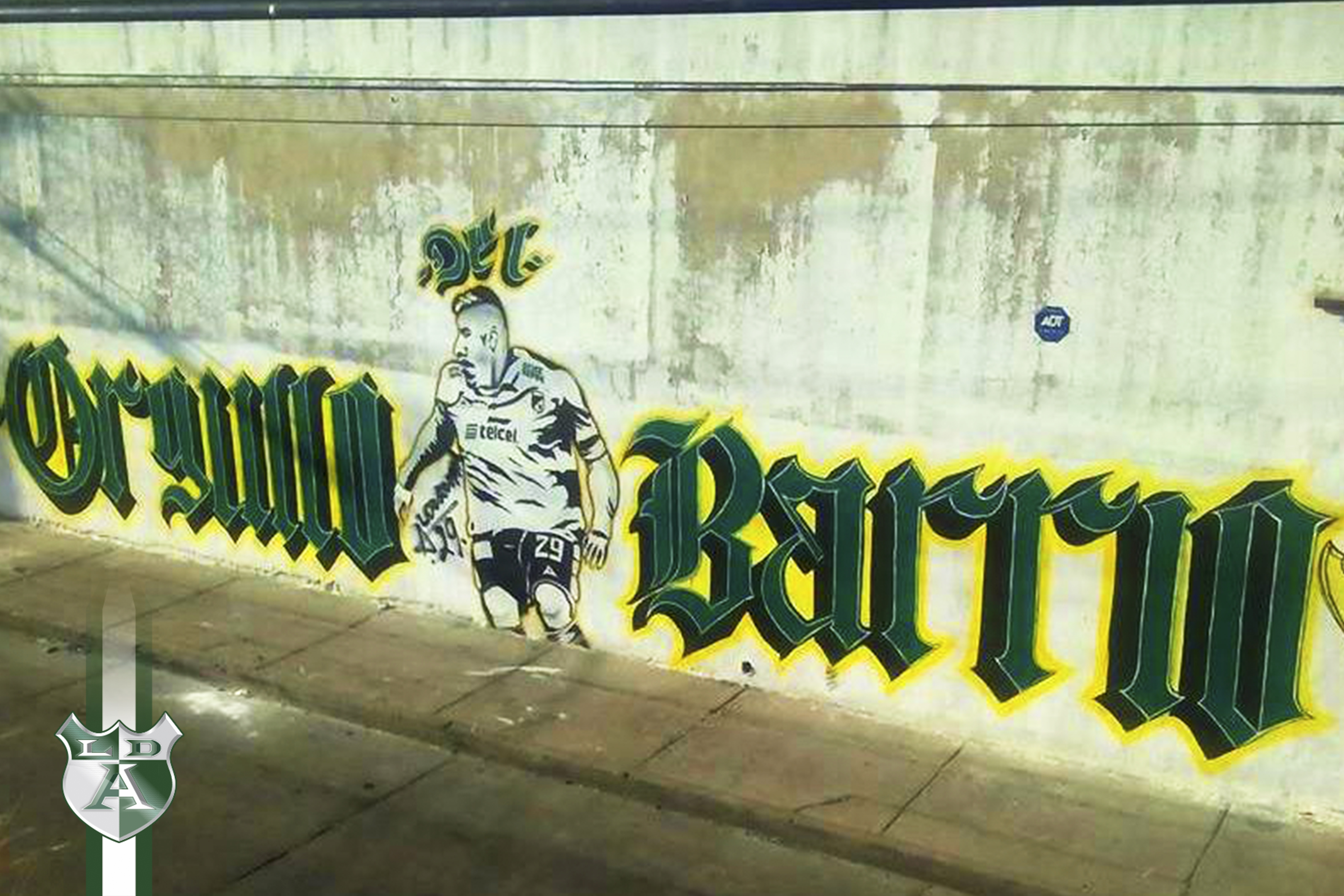 La barra homenajea al jugador